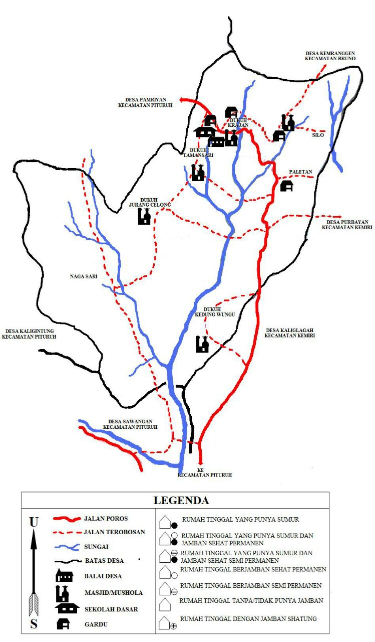 Peta Wilayah Desa Wonosido